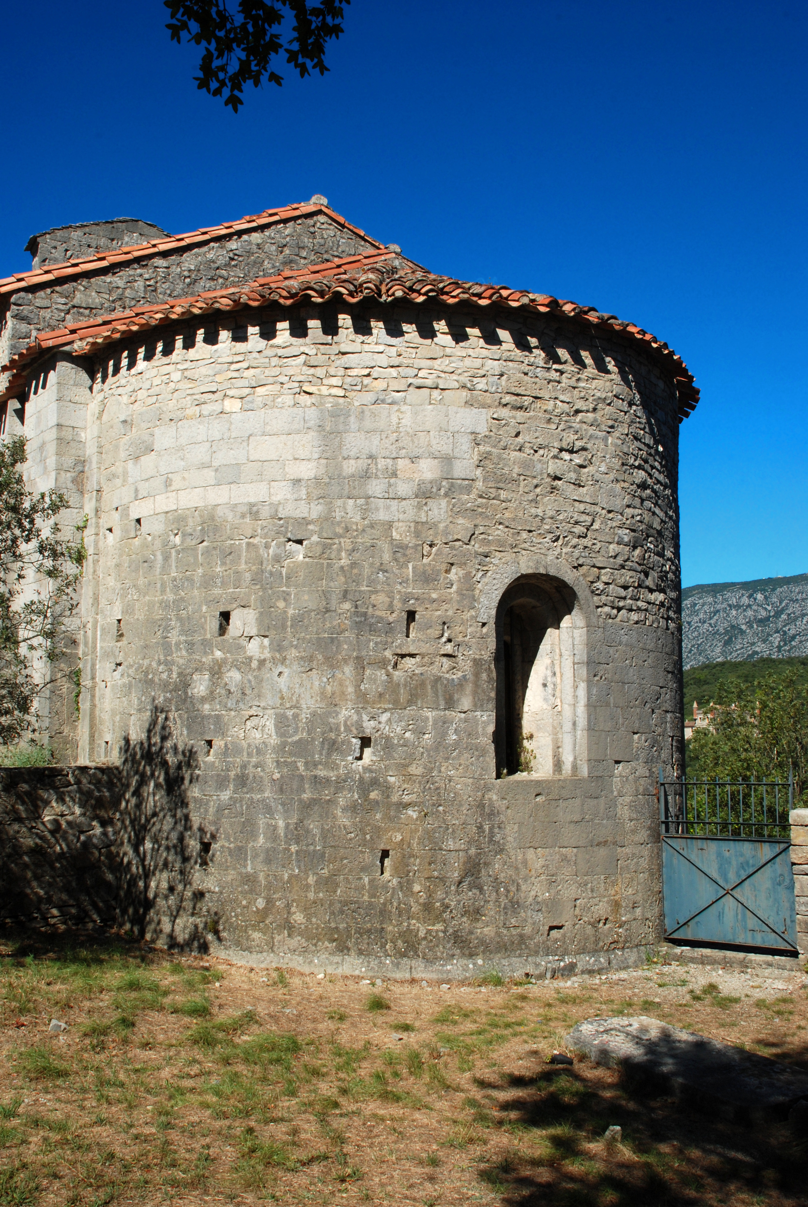 France - Hérault - Brissac - Chapelle Saint-Étienne d'Issensac